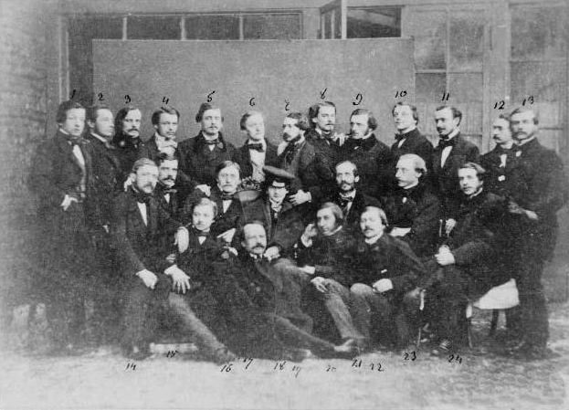 Polscy ziemianie (uczestnicy warszawskiego karnawału z 1857). Na fotografii: 1. Domaniewski; 2. Jan Skrzyński (1833-?); 3. Jan Górski (1827-1898); 4. Karol (hr.) Zamoyski (1834-1892); 5. Antoni Potocki (1834-1863); 6. Stanisław (hr.) Kossakowski (1837-1905); 7. Gustaw (hr.) Tarnowski (1829-1906); 8. Jan Blümer; 9. Stanisław Okęcki (ok. 1840-1906); 10. Edward Orsetti (1835-1891); 11. Gotard Turno (1835-1915); 12. Feliks (ks.) Ogiński (1828-1893); 13. Tadeusz Węgleński; 14. Antoni (hr.) Ostrowski (1822-1891); 15. Konstanty Górski (1827-1901); 16. Ireneusz [Iwon ?] (hr.) Załuski (1840-?); 17. Franciszek (hr.) Łubieński (1834-1891); 18. Edward Meysztowicz (1821-1889); 19. Anatol Borck; 20. Feliks (hr.) Sobański (1833-1913); 21. Piotr Walewski; 22. Tytus Halpert (1833-1889); 23. Eugeniusz (bar.) Rönne; 24. Adam Łempicki (? -1894).